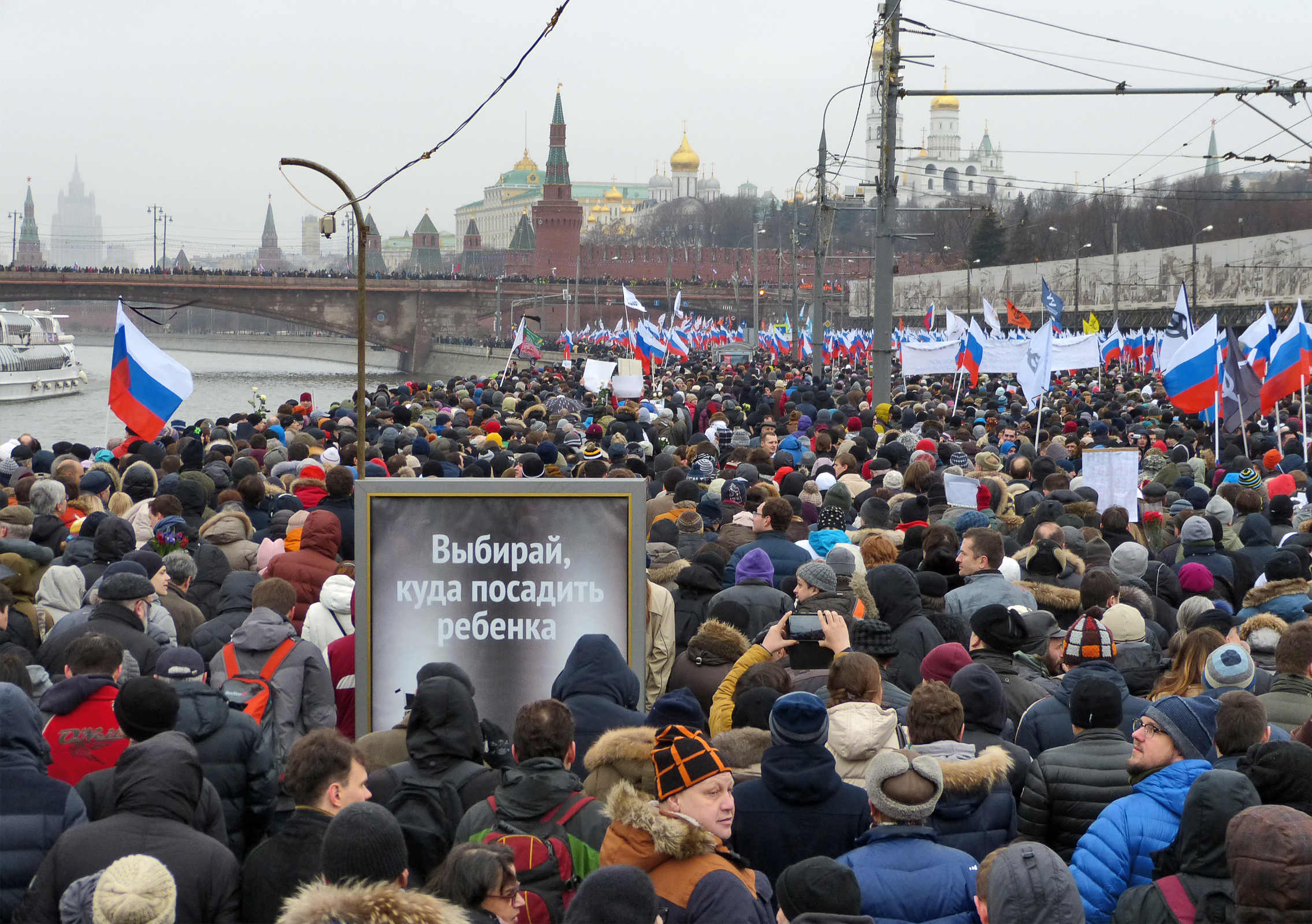 Шествие памяти Бориса Ефимовича Немцова. Москва, Москворецкая набережная, 1 марта 2015 года. Правильное время съёмки — 16 часов 11 минут.